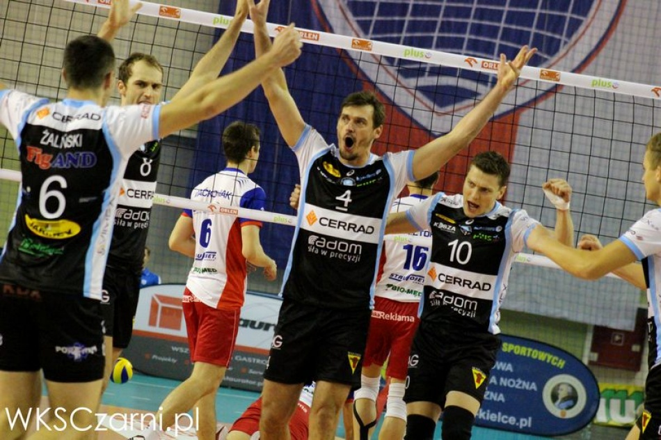 Mecz siatkarski pomiędzy Effectorem Kielcem i Czarnymi Radom. Plusliga 2014-15